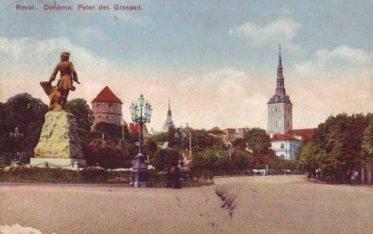 Peeter Suure ausammas Tallinnas Peetri platsil, postkaart